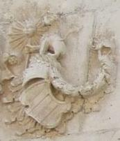 coat of arms of Keglevich de Porychane until ca.1490. "de gueules à deux fasces d'argent" "gules two bars argent"